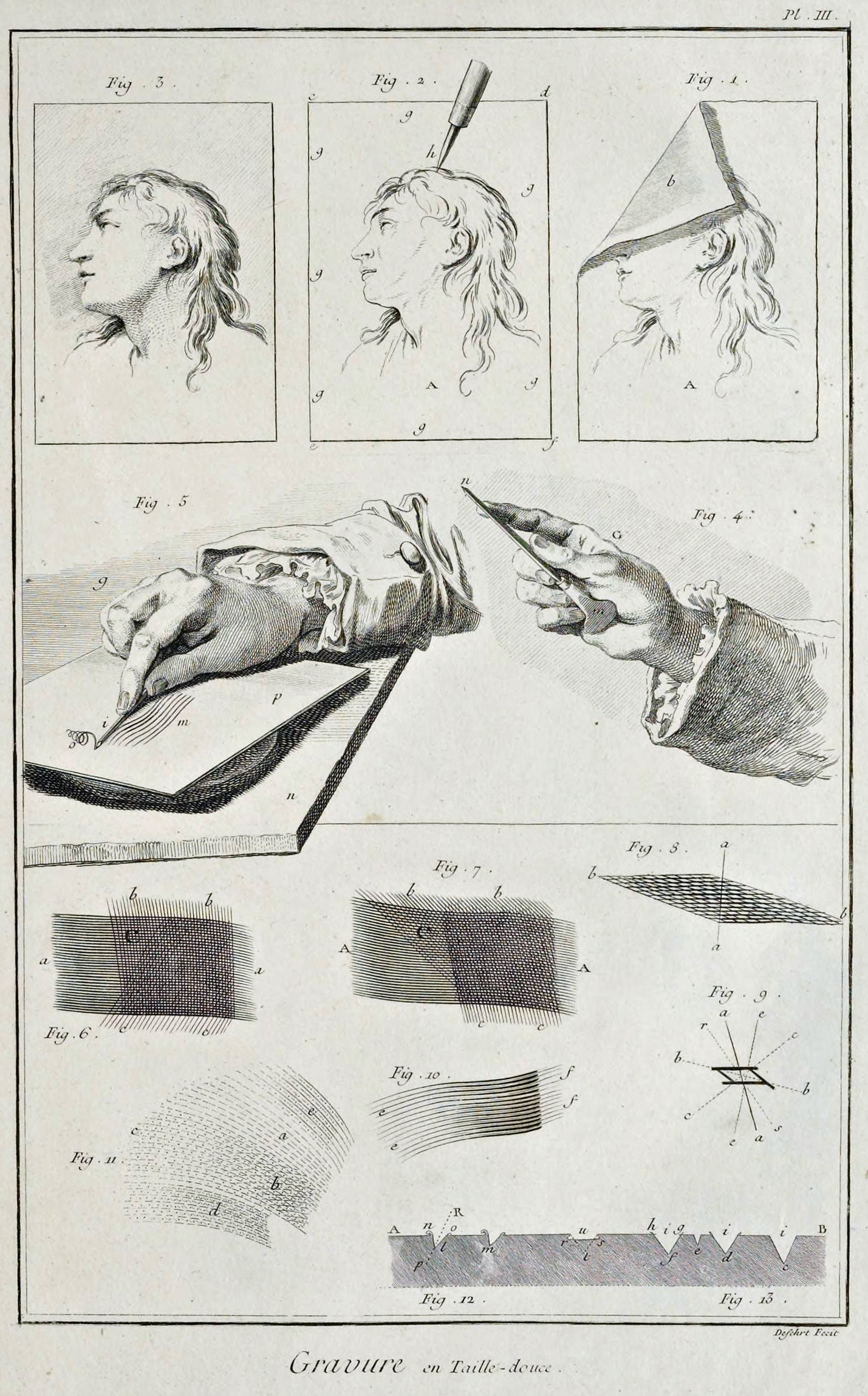 « Gravure en taille-douce », planche III, Gravure et sculpture, volume 4 des planches de L'Encylopédie.